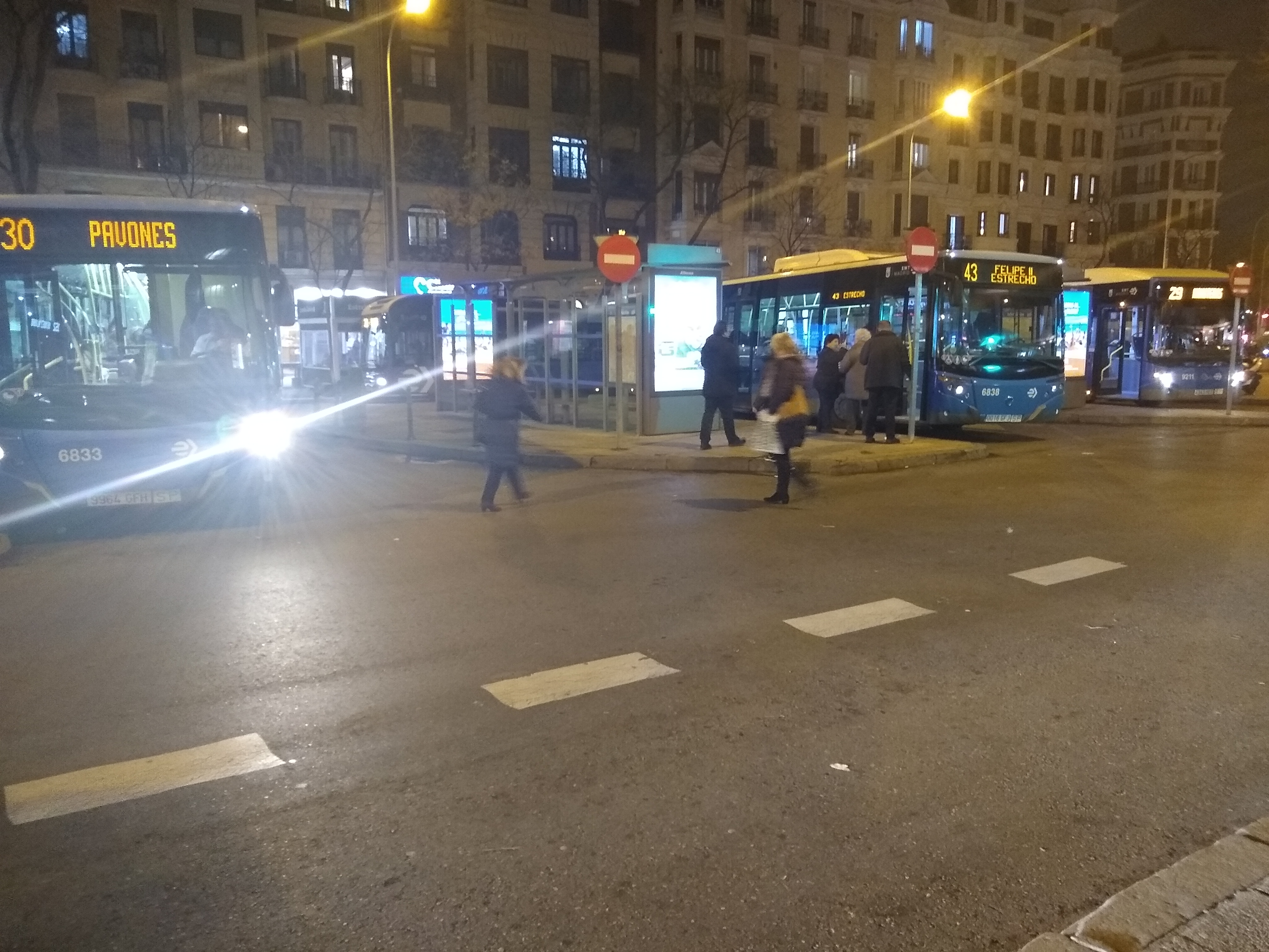 autobuses de la EMT Madrid en sus cabeceras de Felipe II